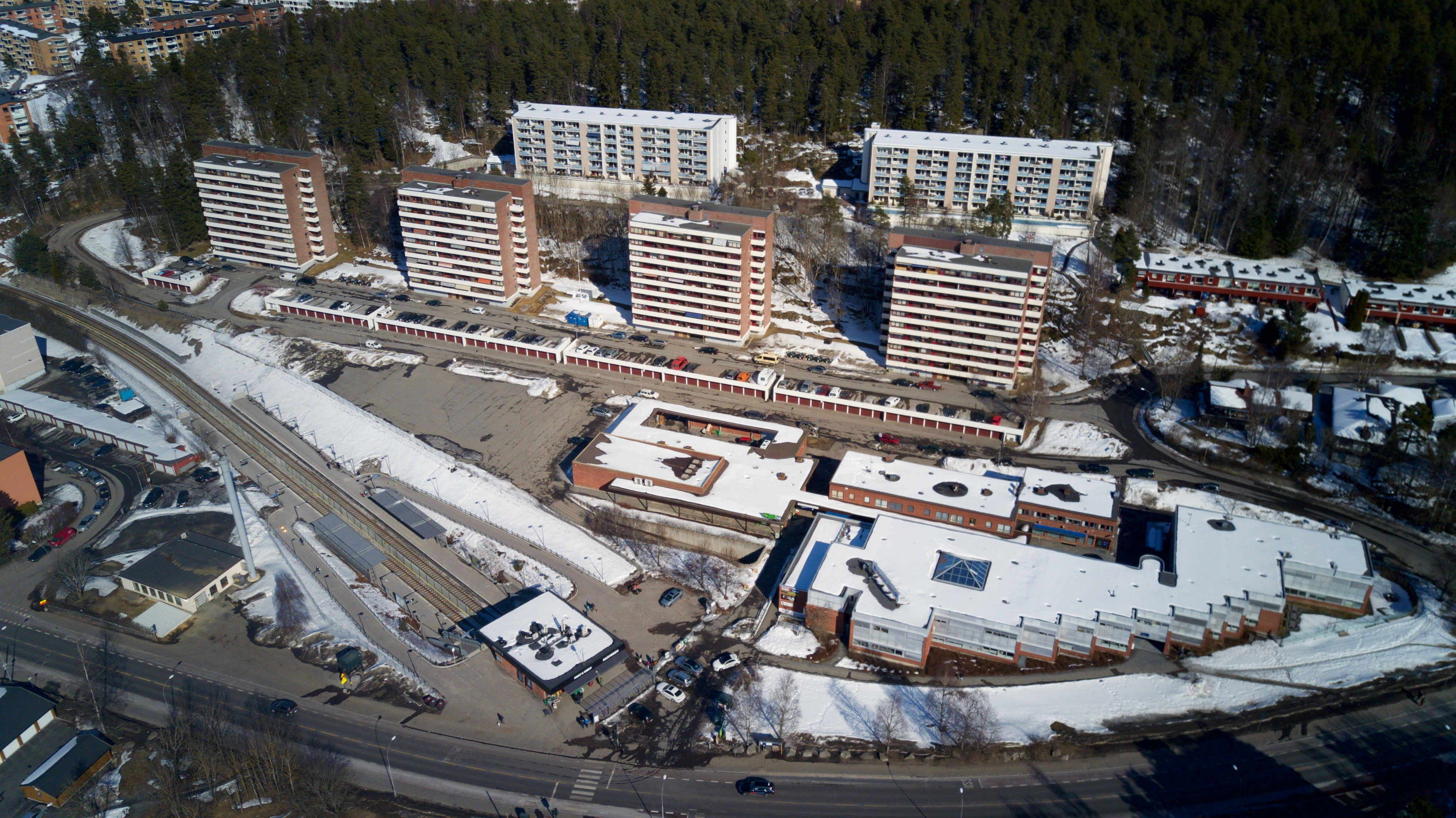 Bogerud senter, Bogerud t-bane, Stallerudveien. Bydel Østensjø i Oslo.